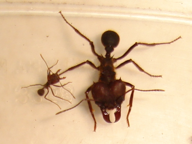 Atta insularis en La Habana recogidas y fotografiadas en una caja